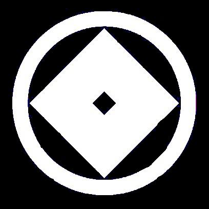 Matsudaira (Ogyu) family crest variant